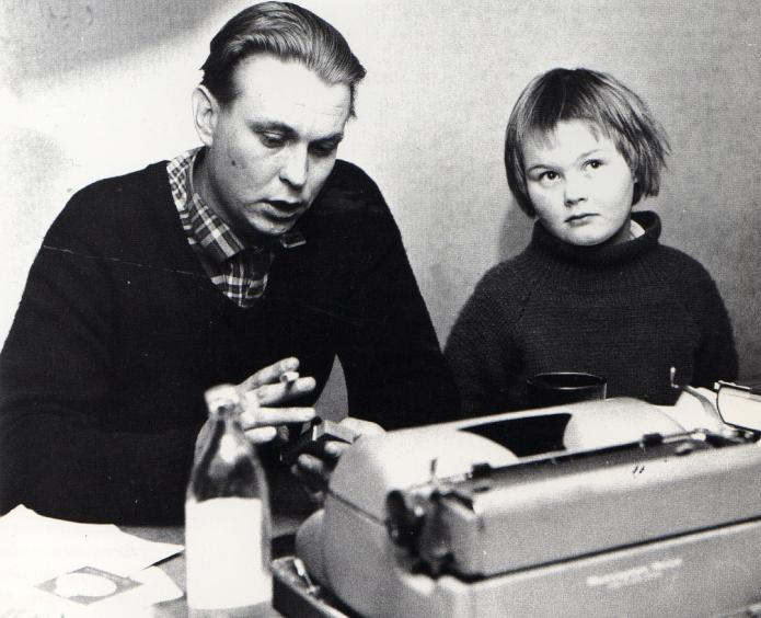 Kirjailija Paavo Rintala syyskuussa 1962 tyttärensä Rauna Marian kanssa.